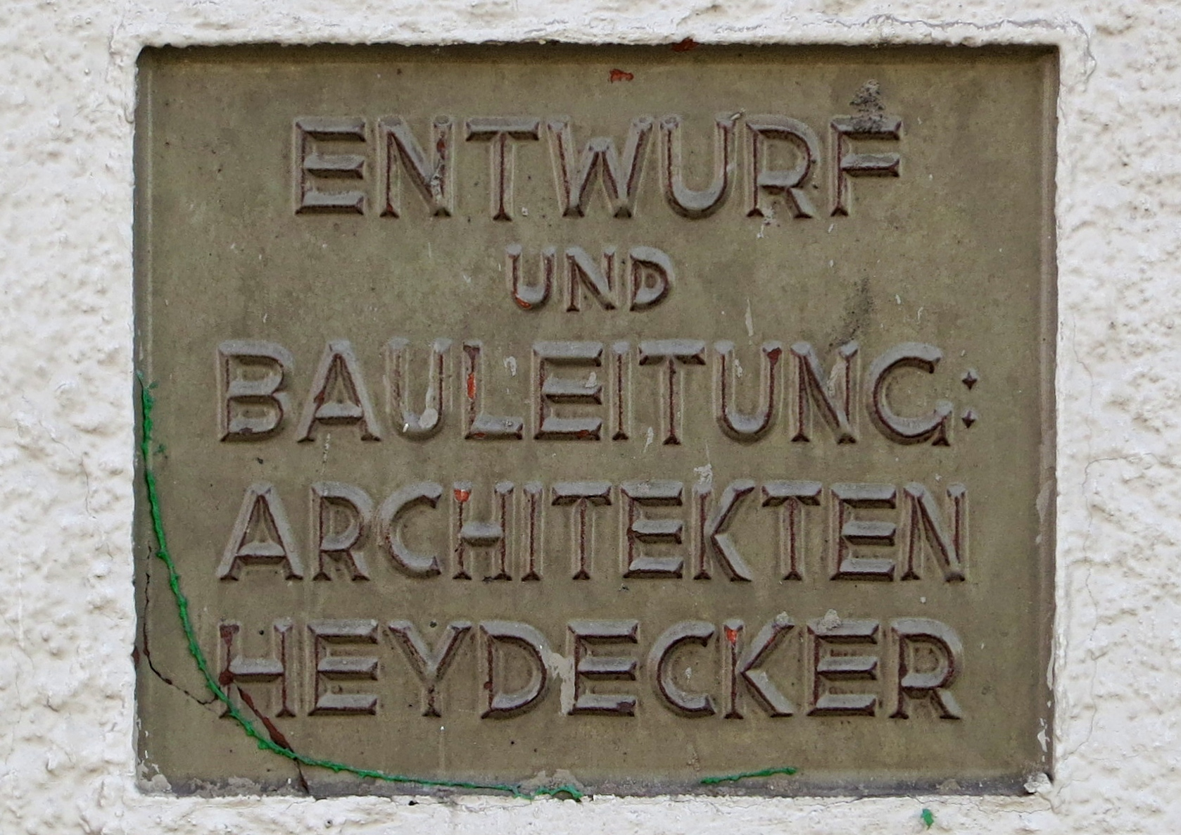 Tafel zur Erinnerung an die Architekten Heydecker an der ehemaligen Flaschenfüllhalle des Allgäuer Brauhauses